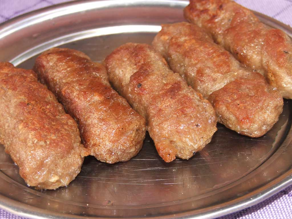 Јелена Ирић, , FujiFilm S5500